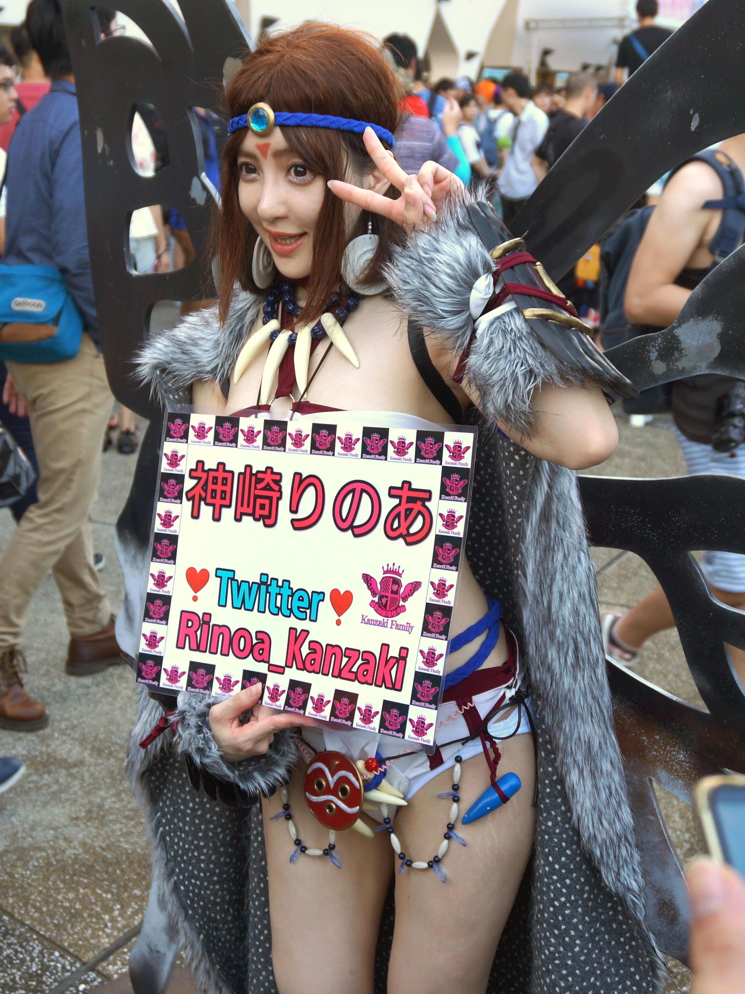 第34屆開拓動漫祭，神崎Rinoa。